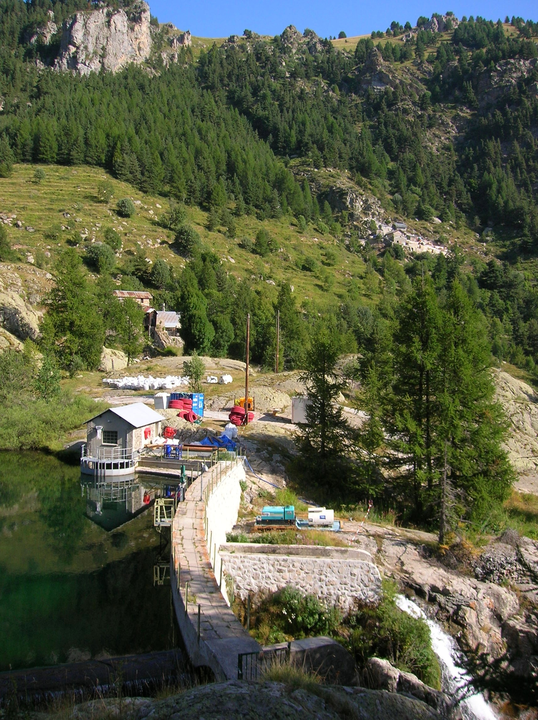 village minier (de l'ancienne minière de Vallauria) et barrage du lac de la minière, dans le Vallon de la minière. rando du Lac des Mesches à la Vallée des Merveilles . Tende, Alpes-Maritimes, Provence-Alpes-Côte d'Azur, France.